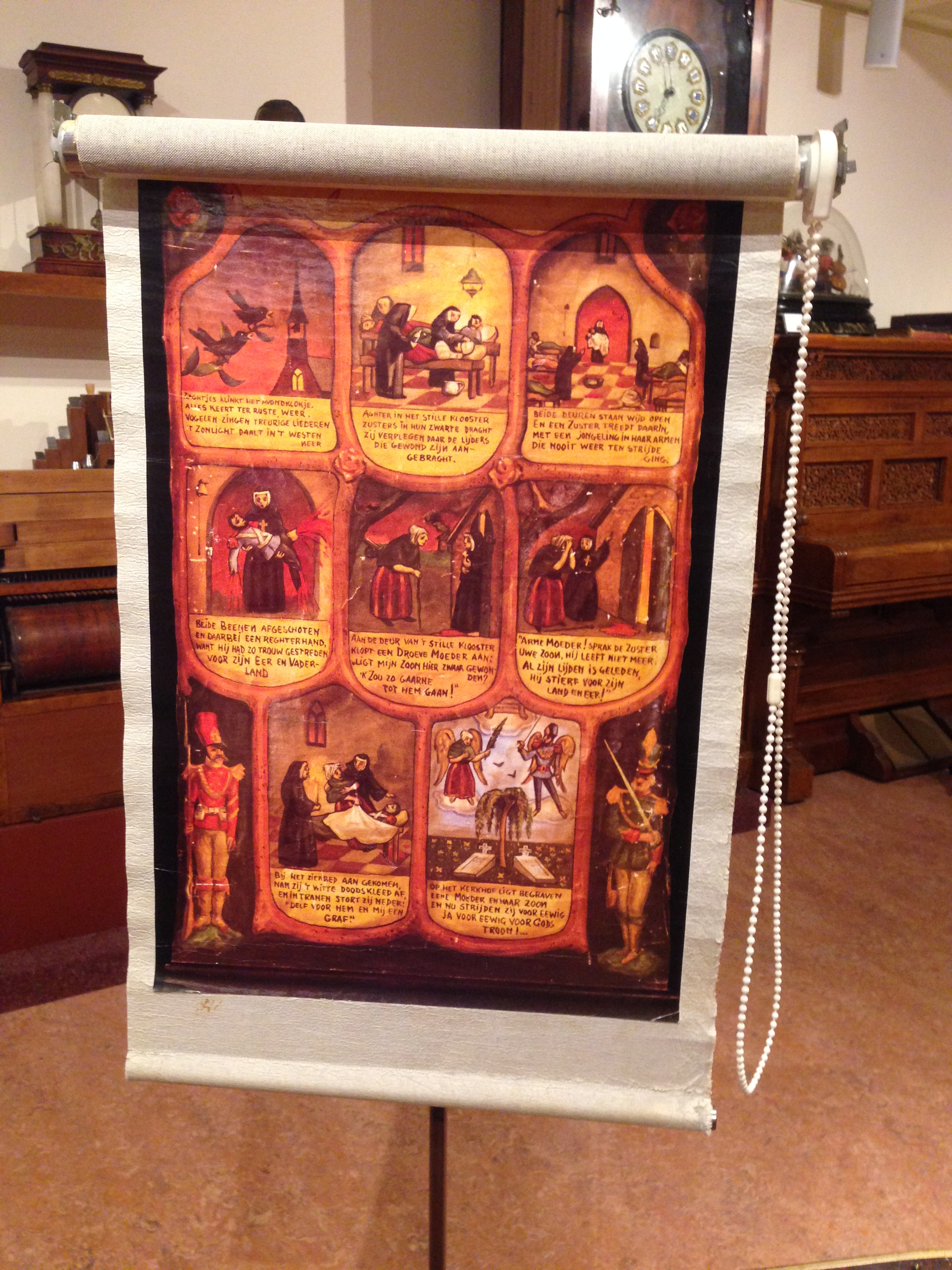 Kijk & Luistermuseum, Bennekom, Netherlands